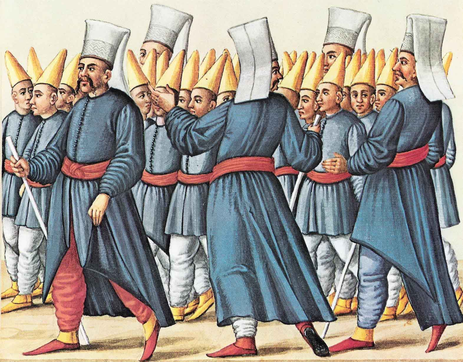 ανήλικα παιδιά απάγονται από τους γονείς τους για στρατολόγηση από την Οθωμανική αυτοκρατορία (παιδομάζωμα)